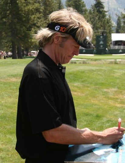 Jack Wagner